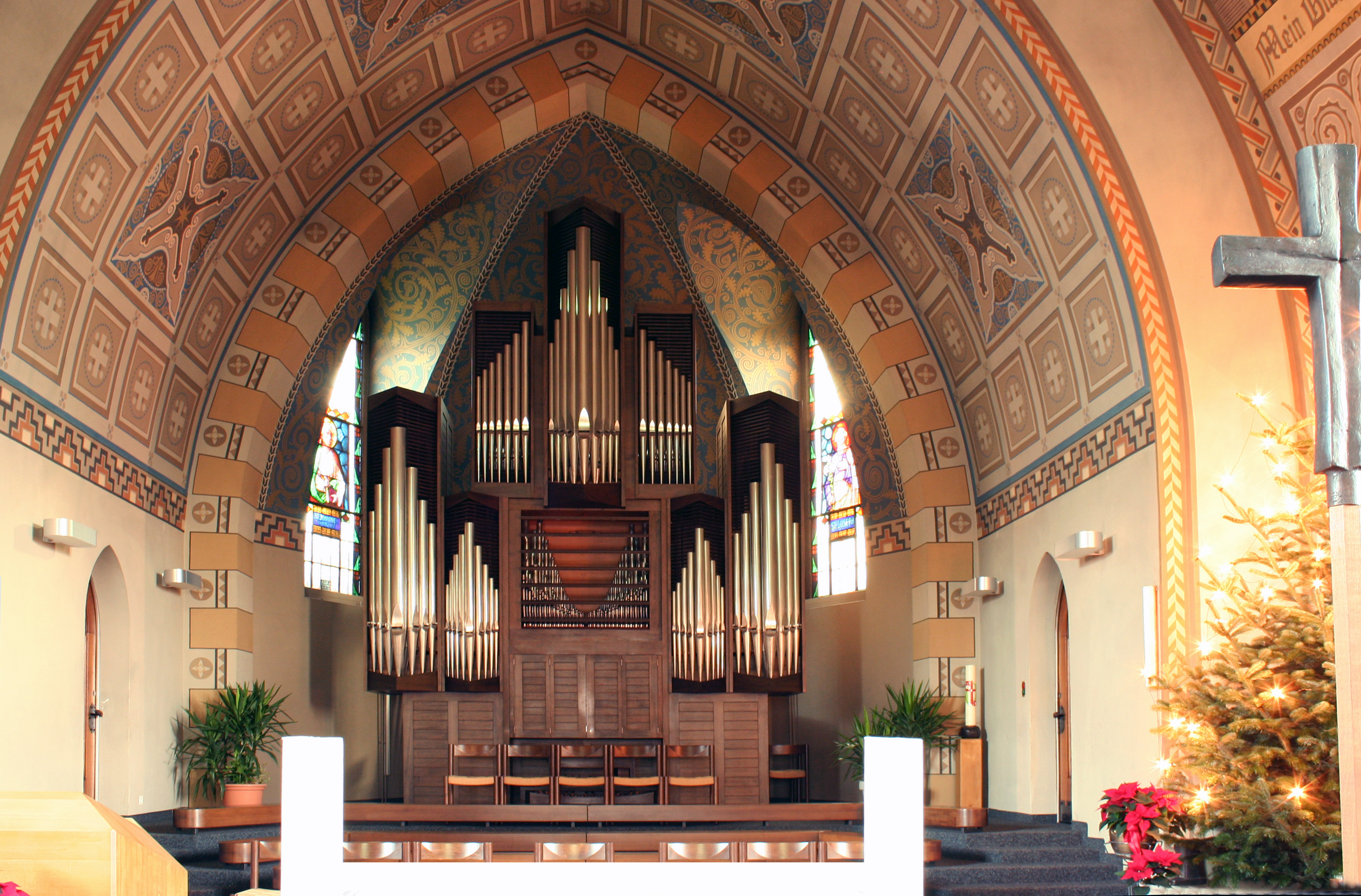 Römisch-katholische Pfarrkirche St. Josef Winterthur-Töss, Orgel